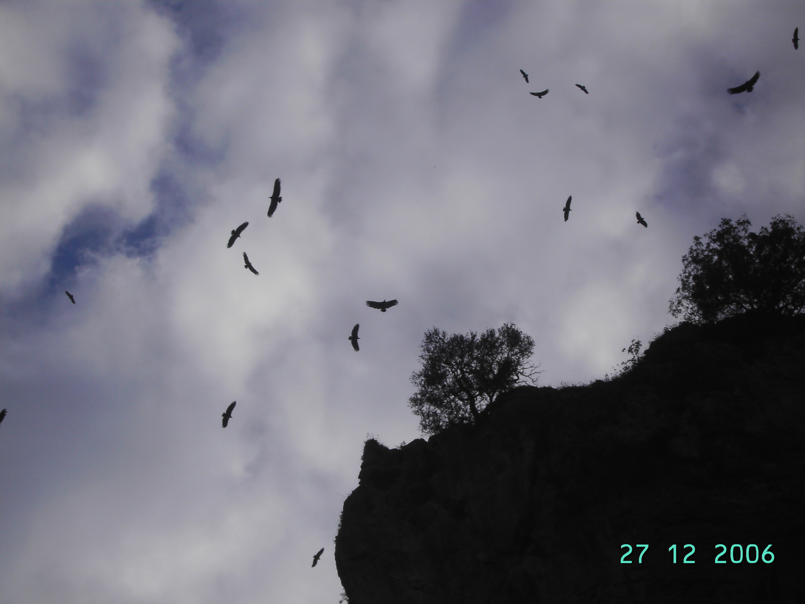 Buitres sobrevolando en la reserva natural del Peñón de Zaframagon. La mayor reserva de estas aves en Europa